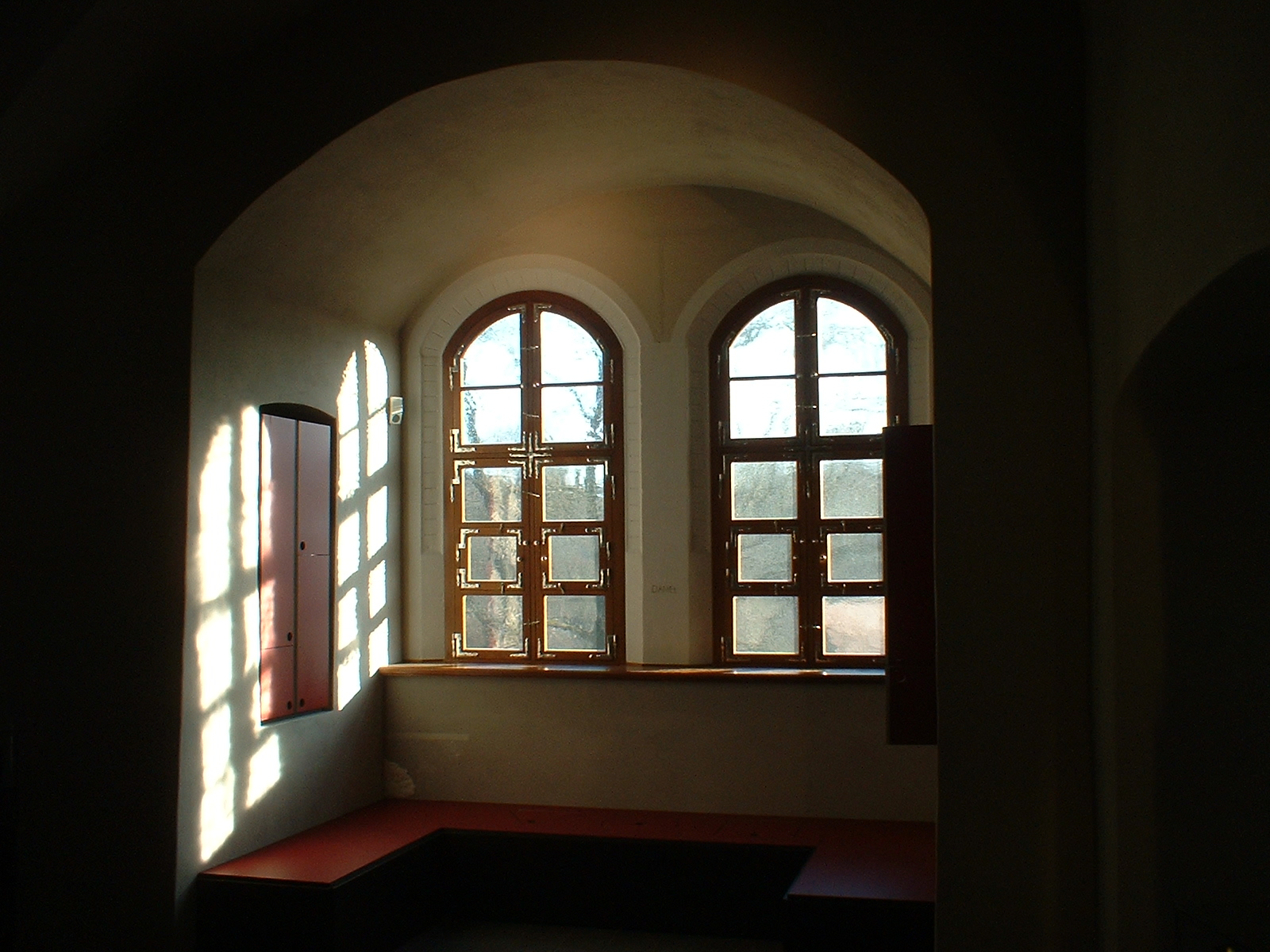 Raum im Schloss Klippenstein